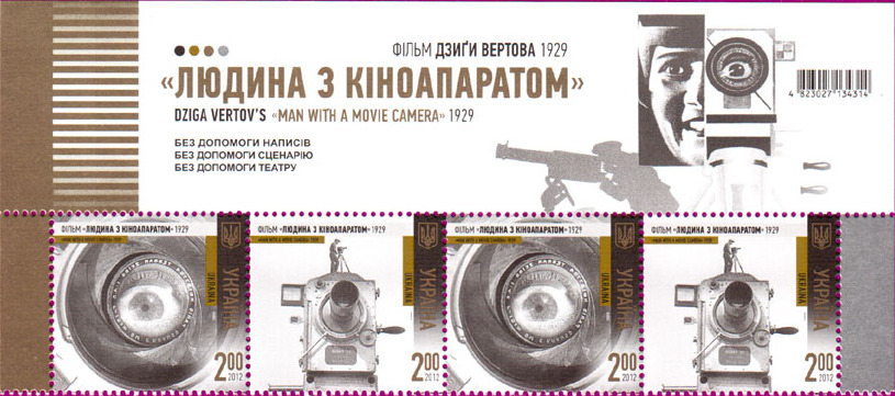 Марка «Фільм «Людина з кіноапаратом». 1929»